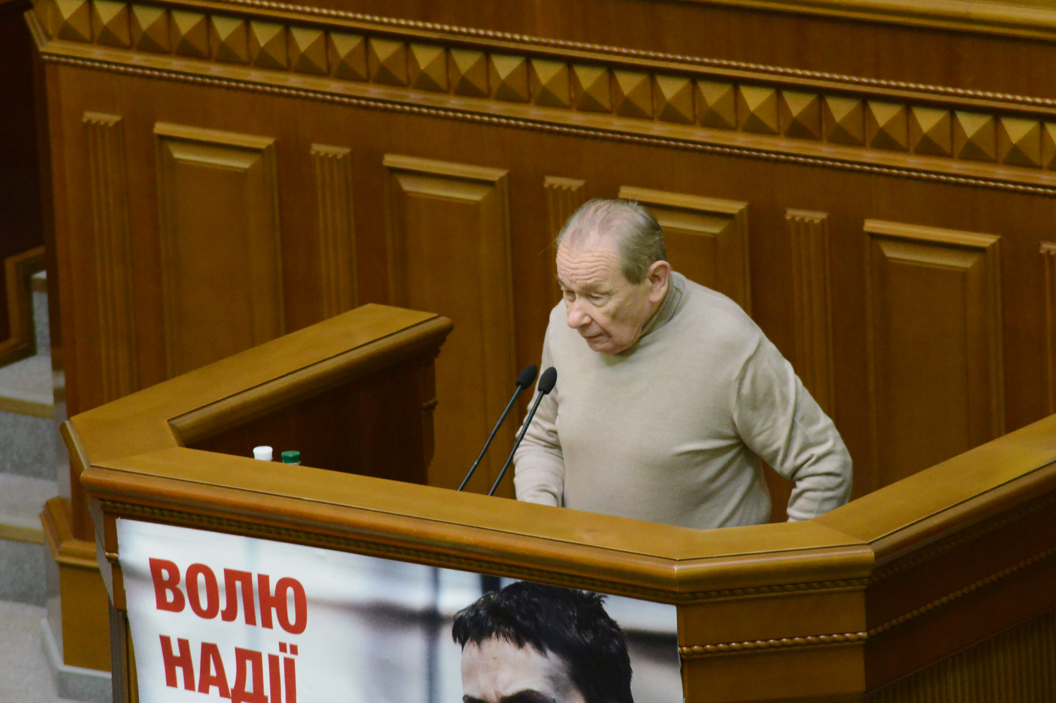 ВЕРХОВНА РАДА УКРАЇНИ 2015 фотограф Вадим Чуприна